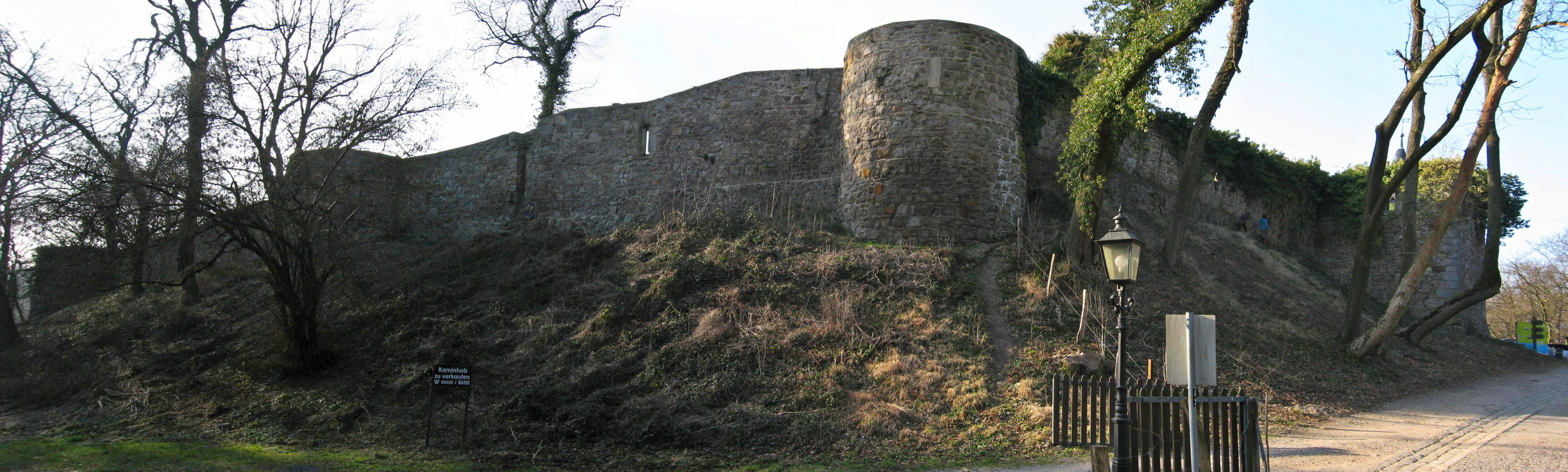 Burg Wilhelmstein, Portal